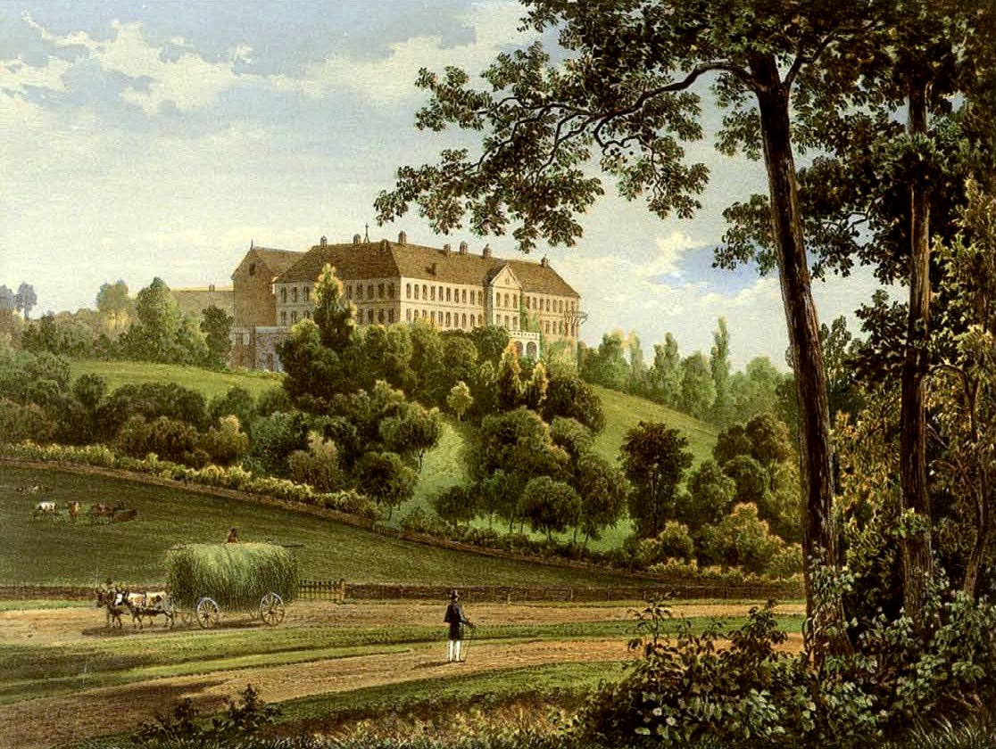 Schloss Cappenberg, Lithografie aus dem 19. Jahrhundert